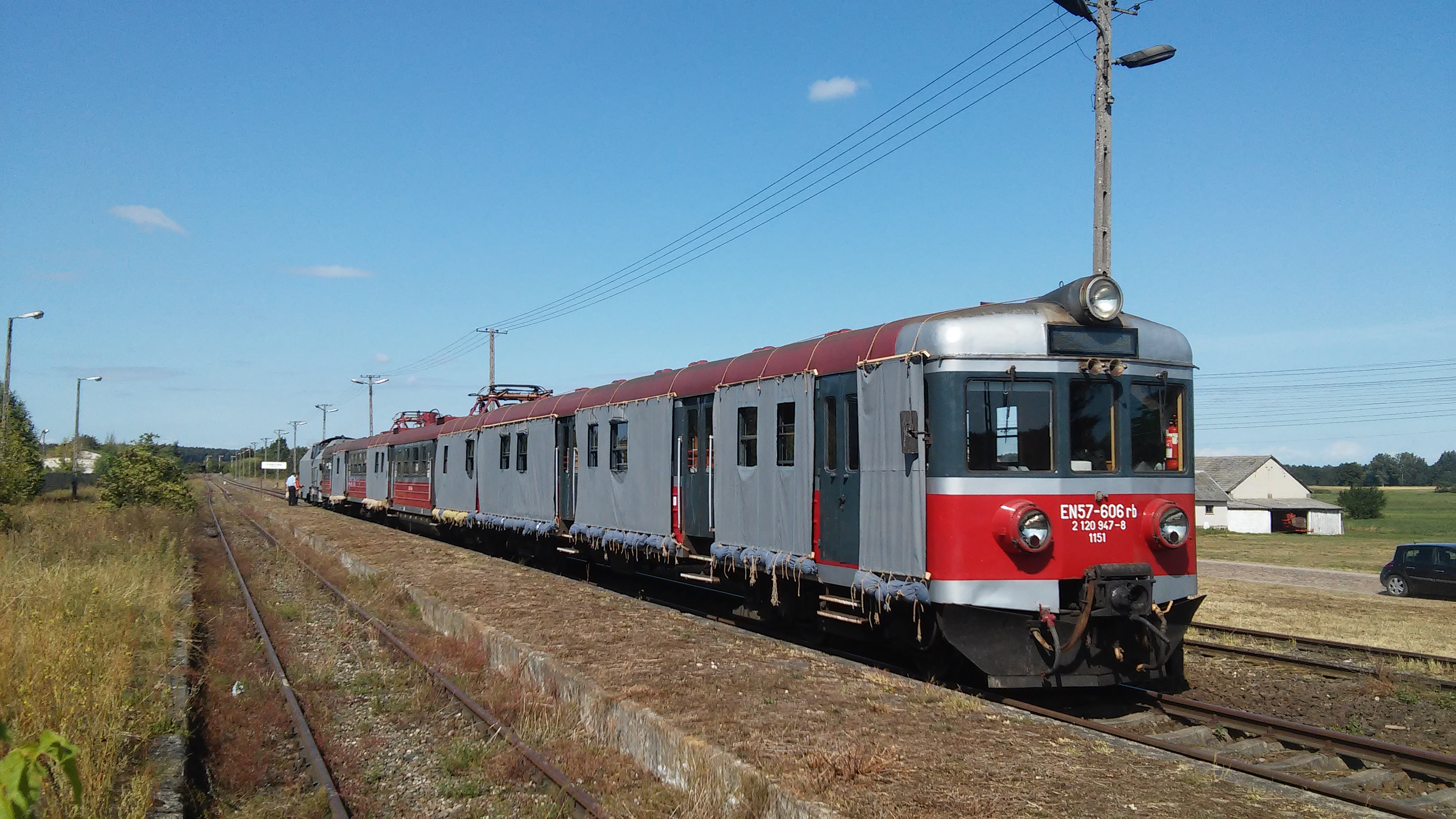 EN57-606 w Sokołach jako część spektaklu teatralnego